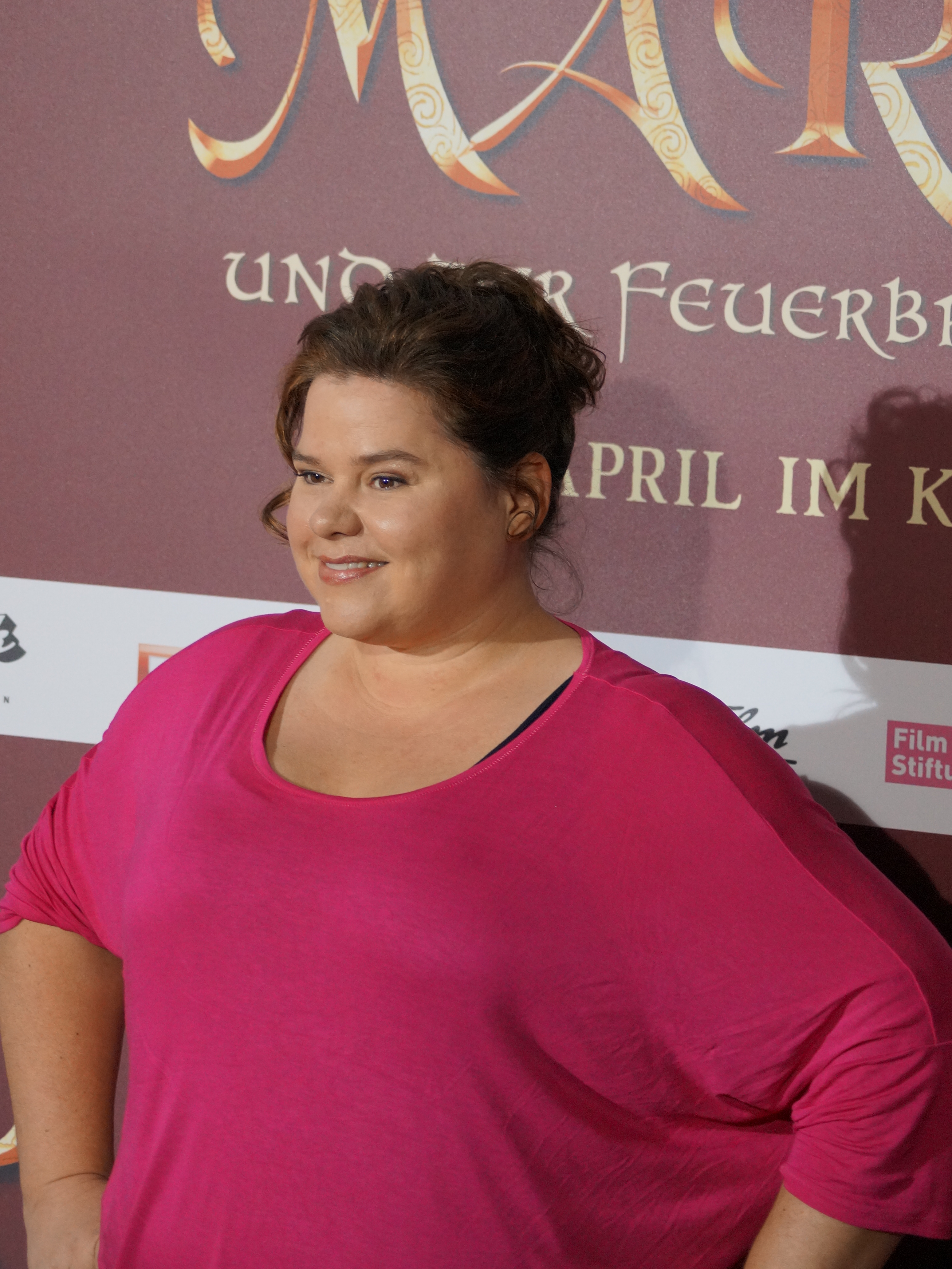 Nadine Wrietz bei der Deutschlandpremiere von "Mara und der Feuerbringer", am 29. März 2015, im Cinedom Köln